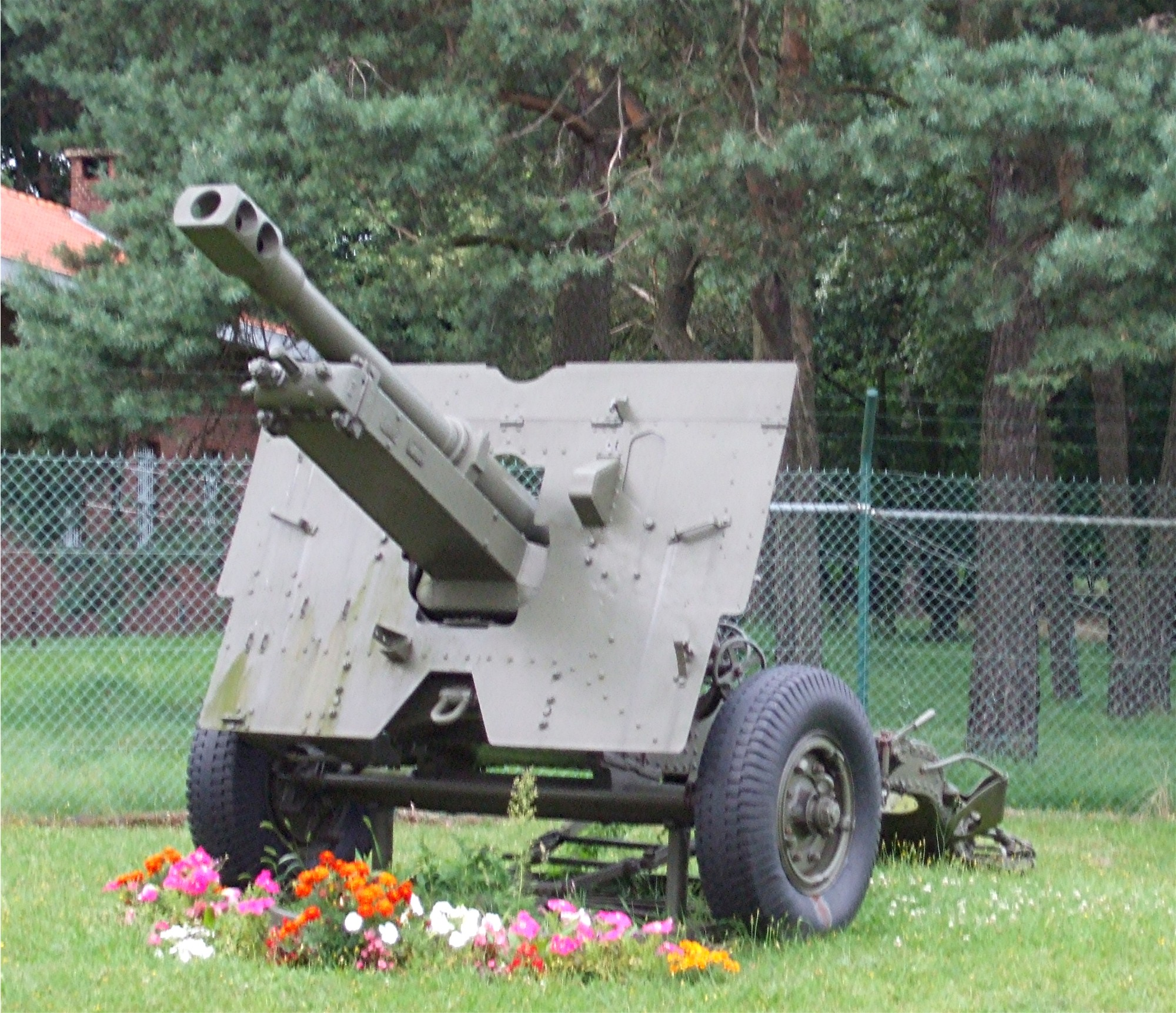 altes Geschütz vor der Kaserne in Helchteren